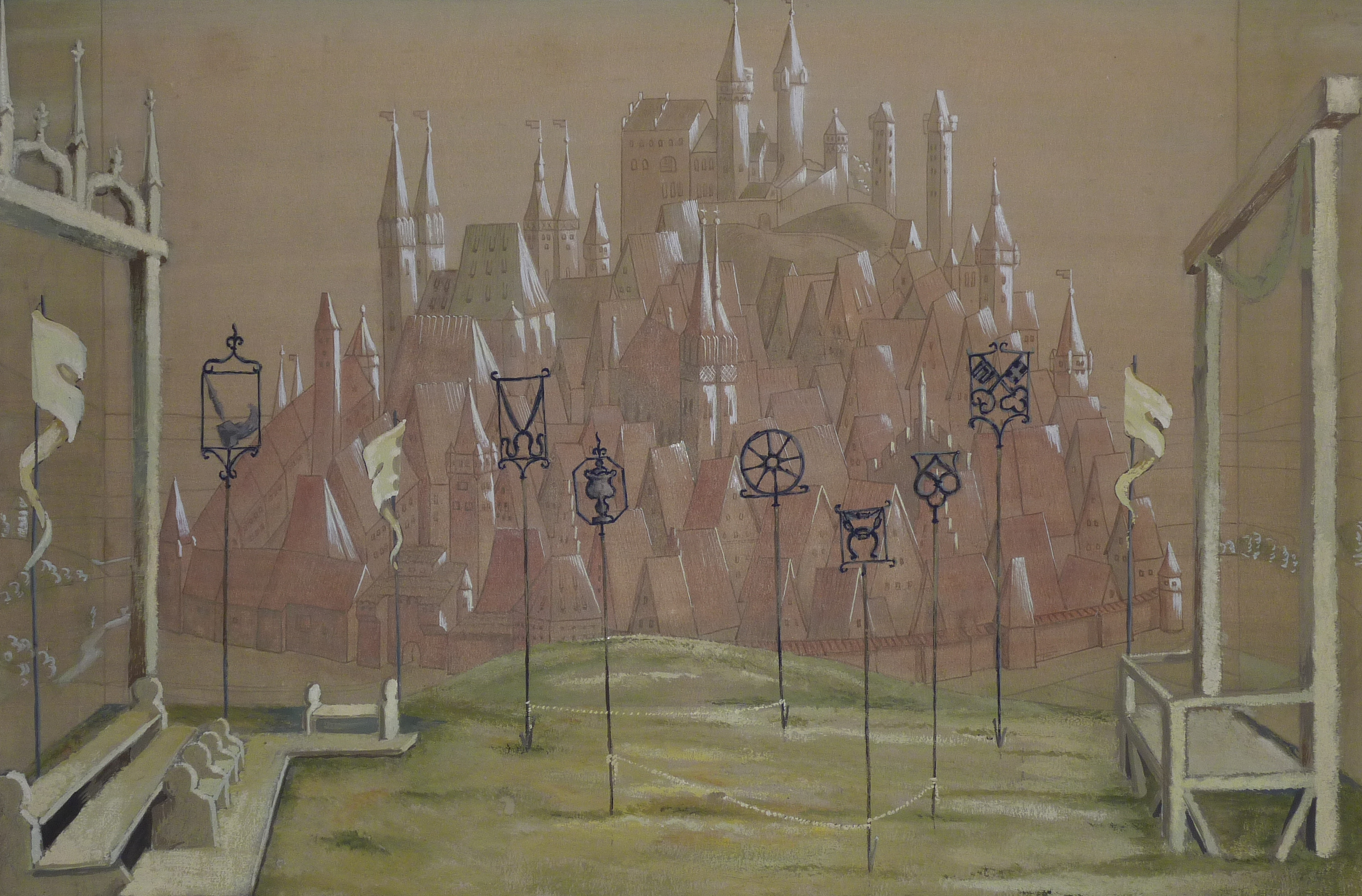 Bühnenbildentwurf von Helmut Jürgens für "Die Meistersinger von Nürnberg" von R. Wagner, 3. Akt, Aufführung München 1949